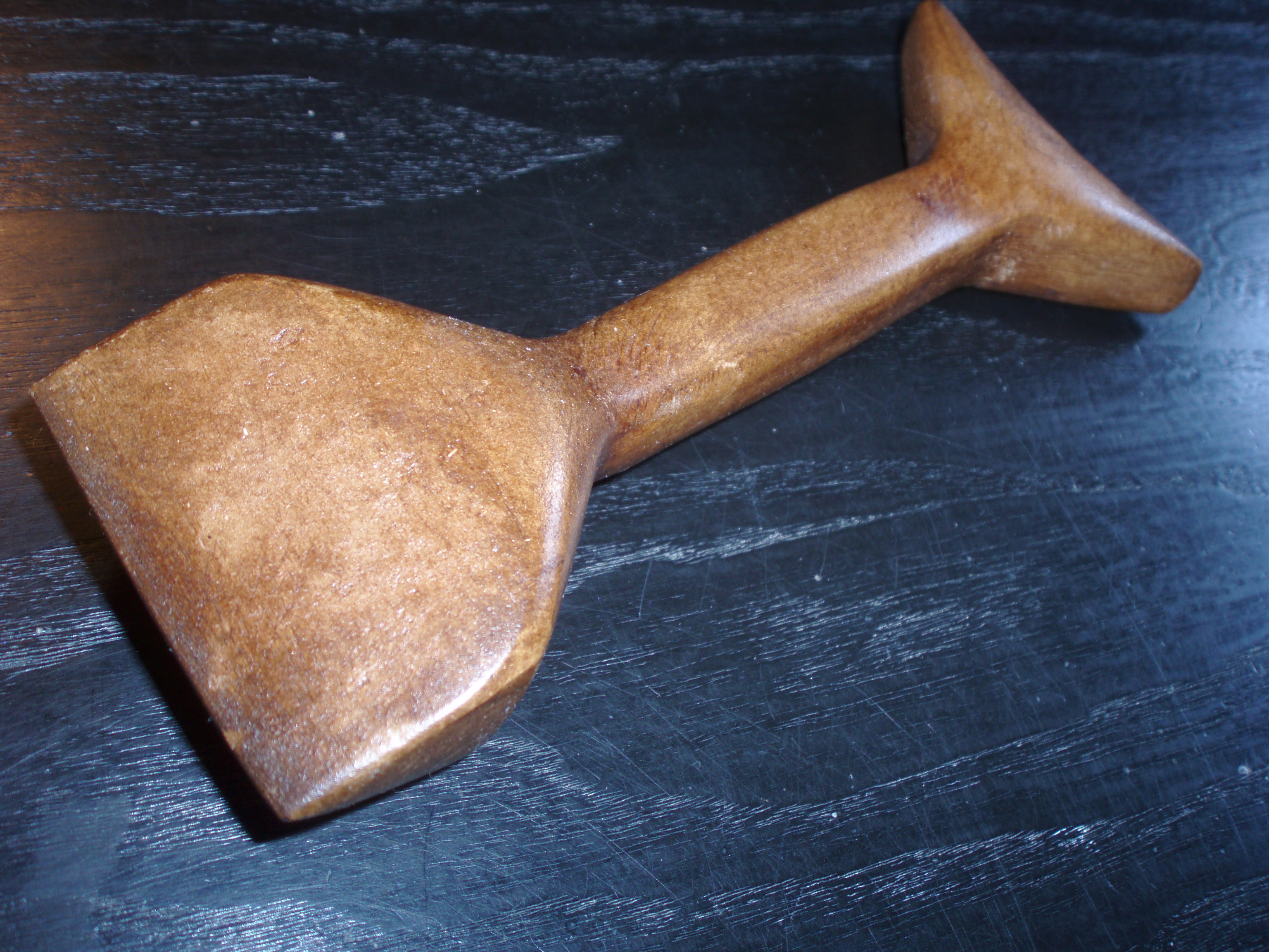 Photo d'un aplatisseur de voile